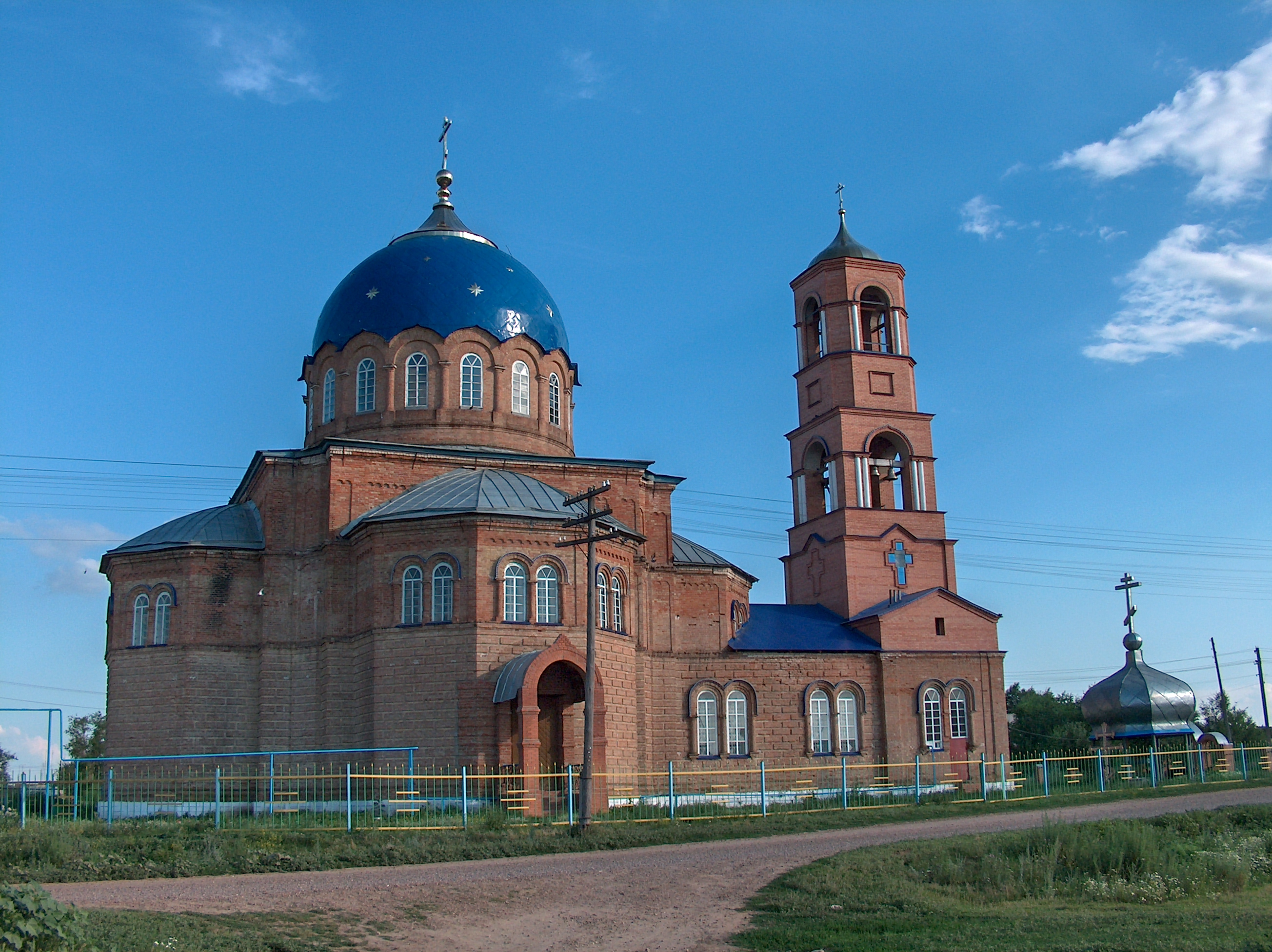 Храм Святой Троицы в селе Утёвка Нефтегорского района Самарской области